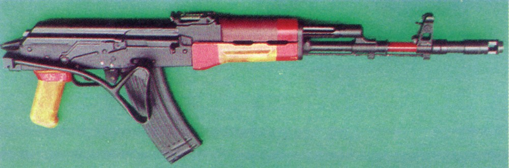 karabinek wz. 1988 Tantal